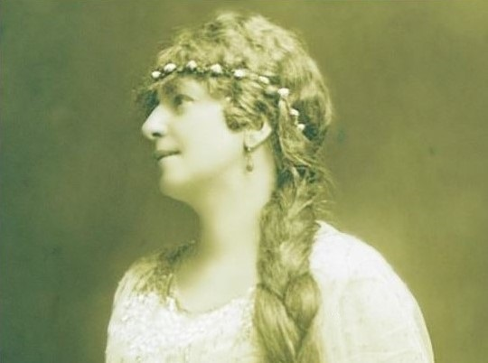 Adine Fafard-Drolet dans le rôle de Marguerite